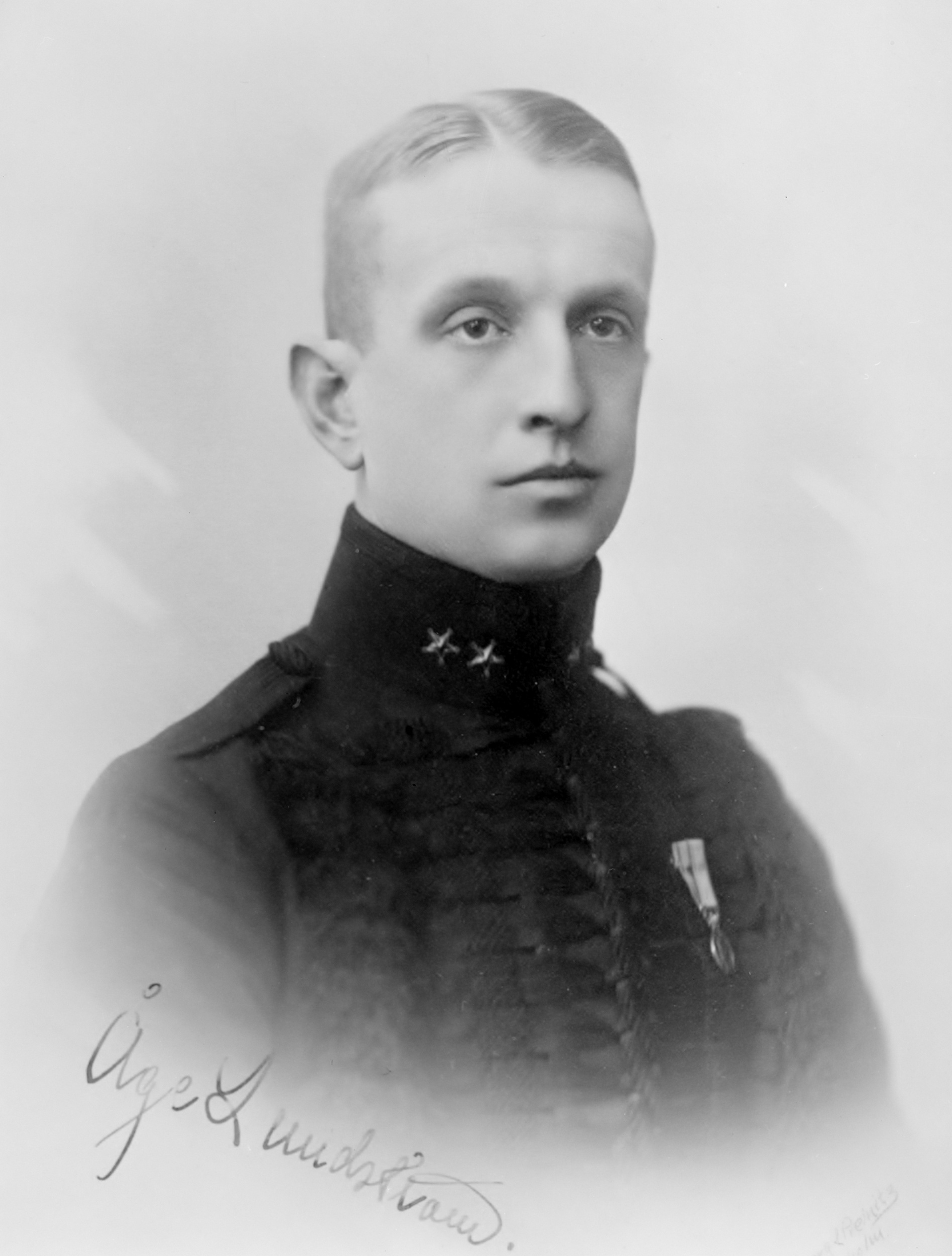 Motiv: Porträtt av militära flygpionjären, Åge Lundström från Livregementets dragoner. Porträttet är signerat av Lundström. Tillhör Gamla Malmen-samlingen. GM 1058. Ur Flygvapenmuseums bildarkiv